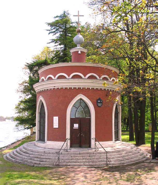 Часовня во имя Иконы Божией Матери "Всецарица", Санкт-Петербург. Архитекторы В.С.Васильковский и П.А.Арешев. 1953 - 1954 годы, реконструкция В.С.Васильковский - 2002 год.